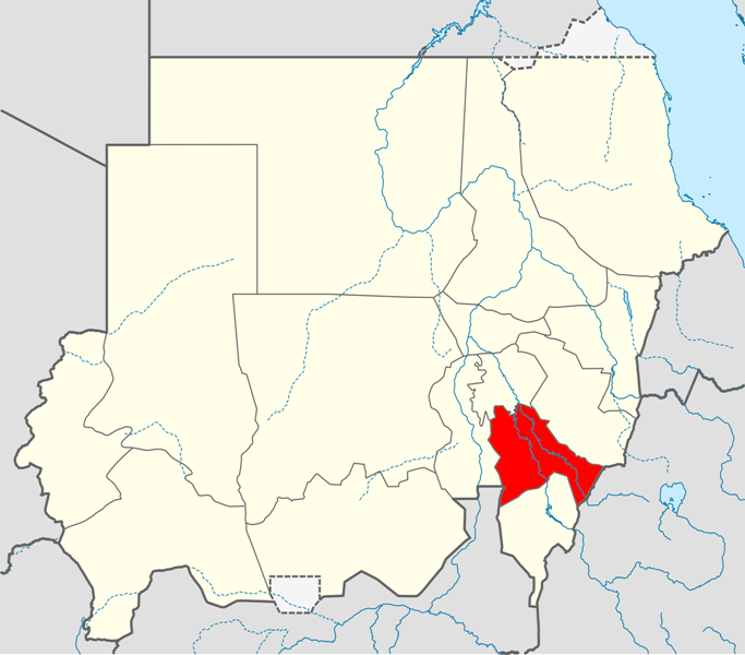 Locator map